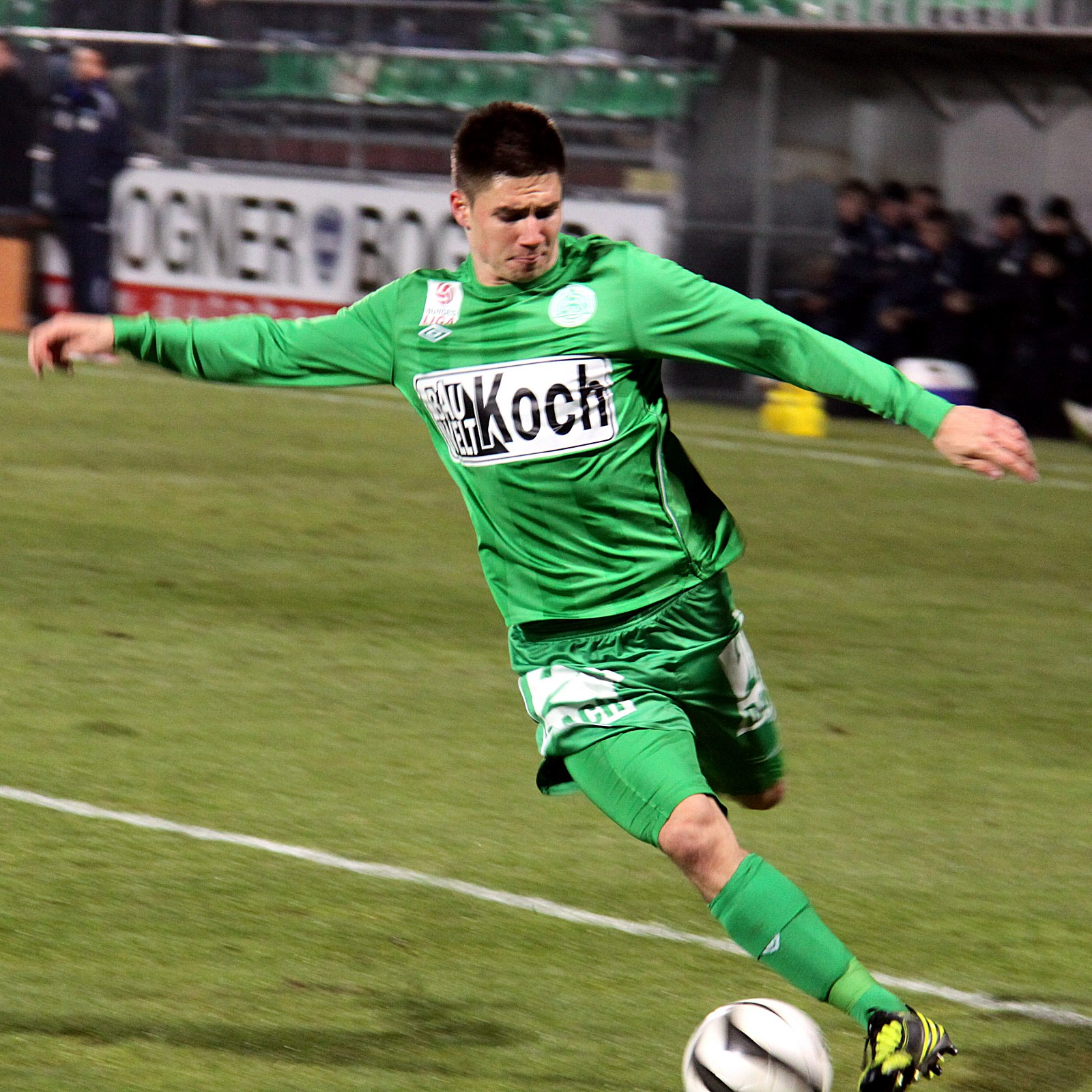 Meisterschaftsspiel SV Mattersburg (grüne Trikots) gegen SK Sturm Graz (weiße Trikots). – Das Bild zeigt: Patrick Farkas (SV Mattersburg). Object location47° 44′ 21.67″ N, 16° 24′ 23.15″ E